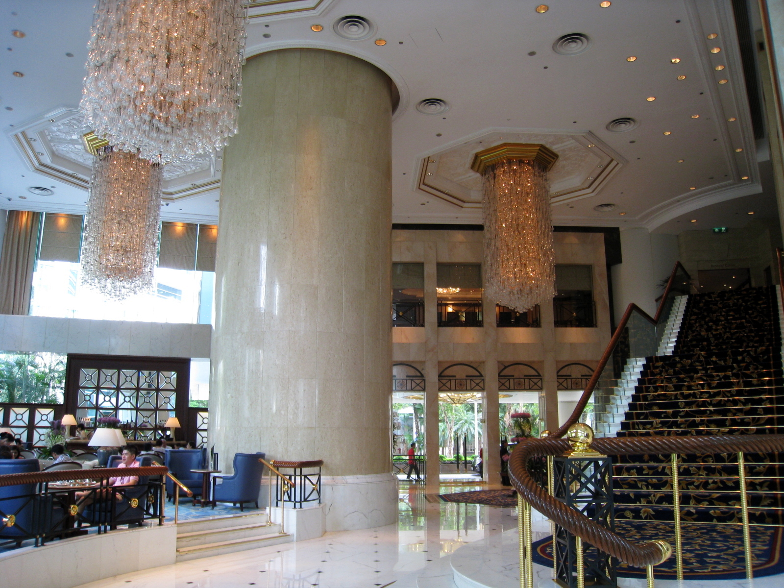 Island Shangri-La Hotel 香格里拉酒店